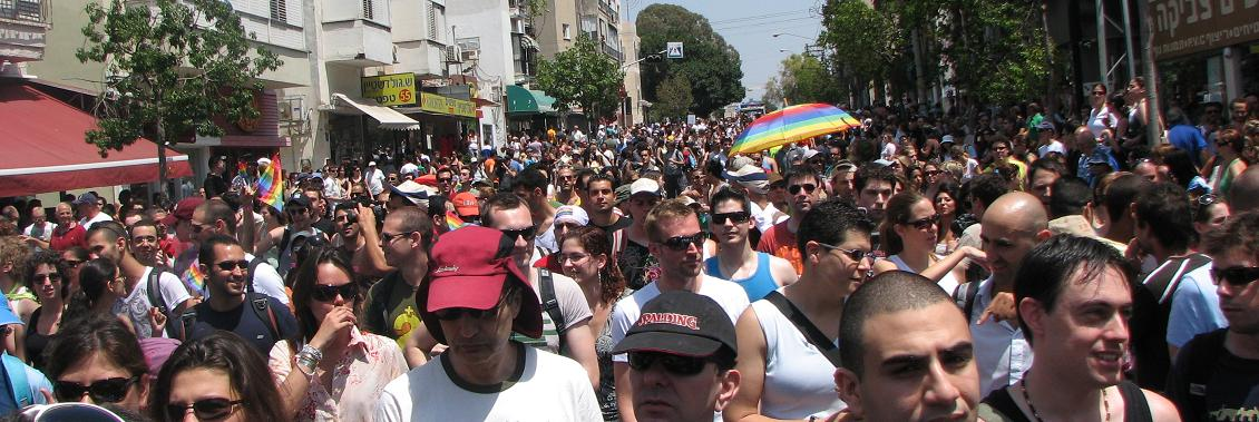 מצעד הגאווה 2008 - תל אביב